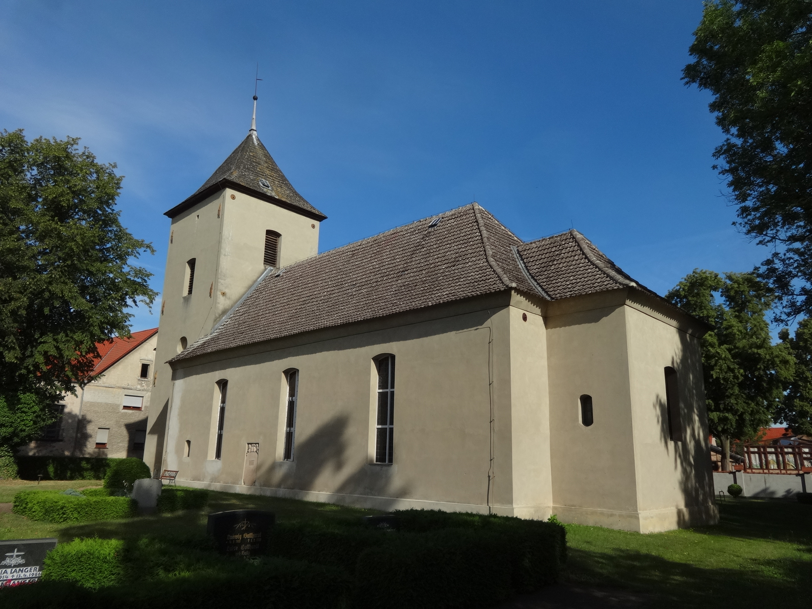 Die Saalkirche entstand im 18. Jahrhundert und wurde 1882 um einen Chor erweitert. Im Innern des flach gedeckten Sakralbaus steht eine Kanzel aus dem 18. Jahrhundert sowie eine Fünte aus dem Jahr 1794.